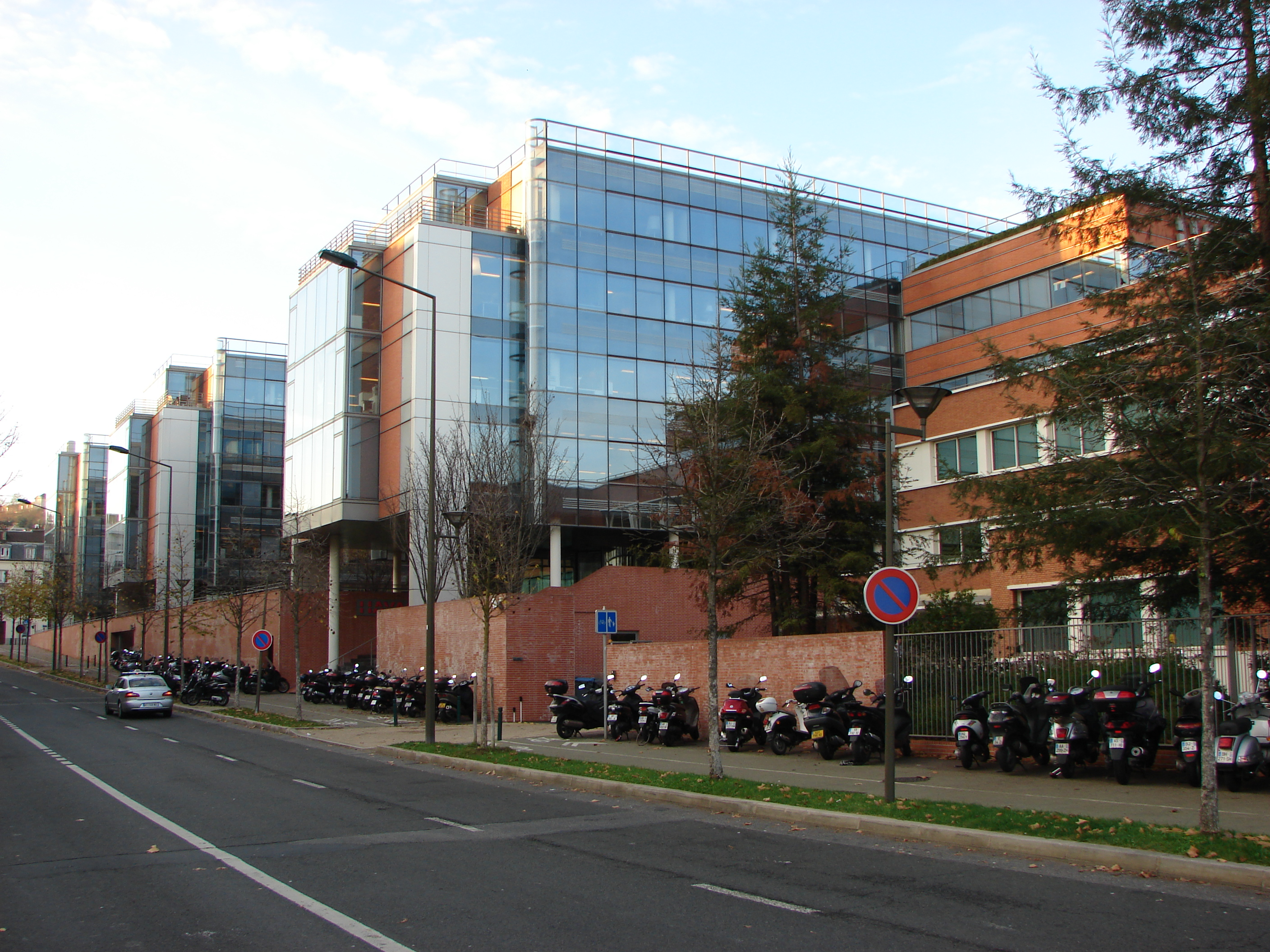 Siège social du groupe Havas vu du sud (ancienne parfumerie Coty, puis Usine Agfa Gevaert)